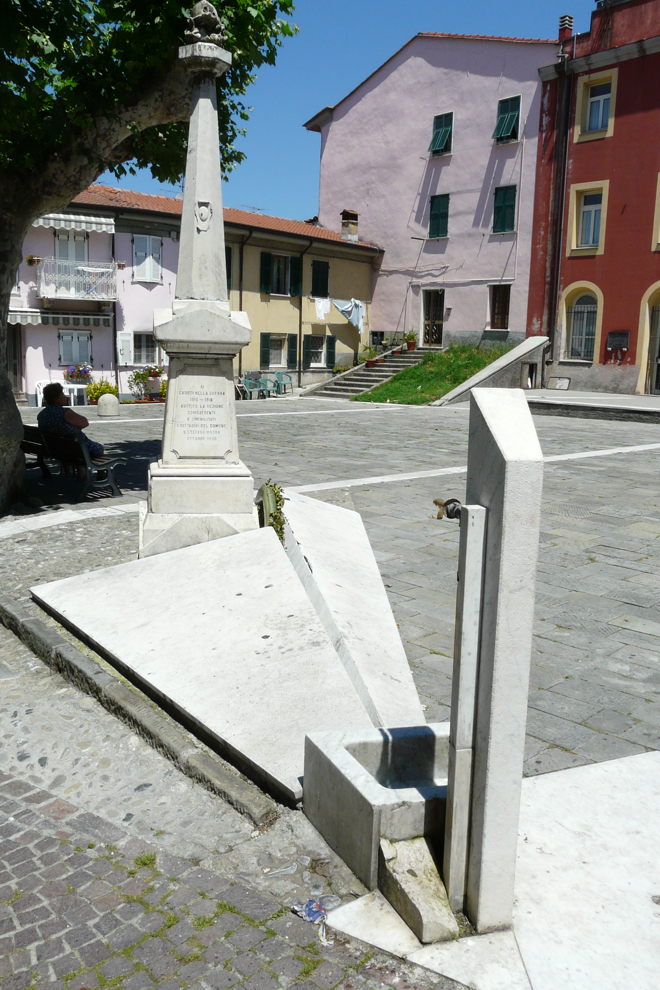 Monumenti ai caduti di Santo Stefano di Magra, Liguria, Italia